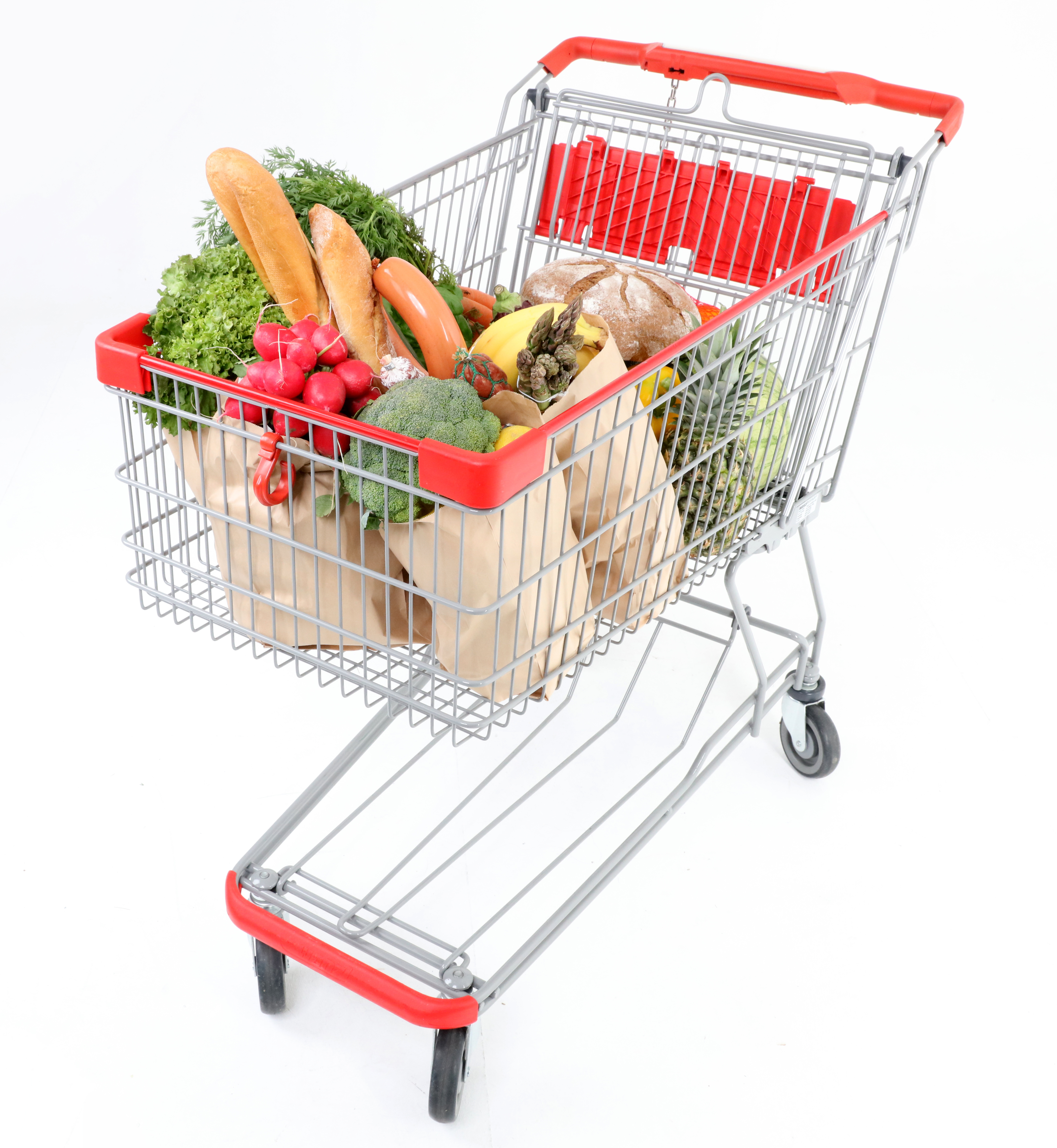 Einkaufswagen